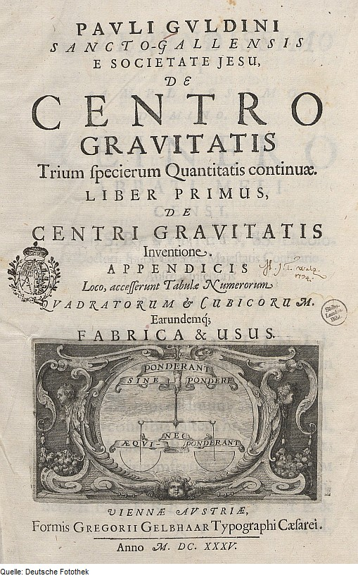 Original image description from the Deutsche Fotothek Physik & Gravitation & Schwerkraft & Wiegeeinrichtung